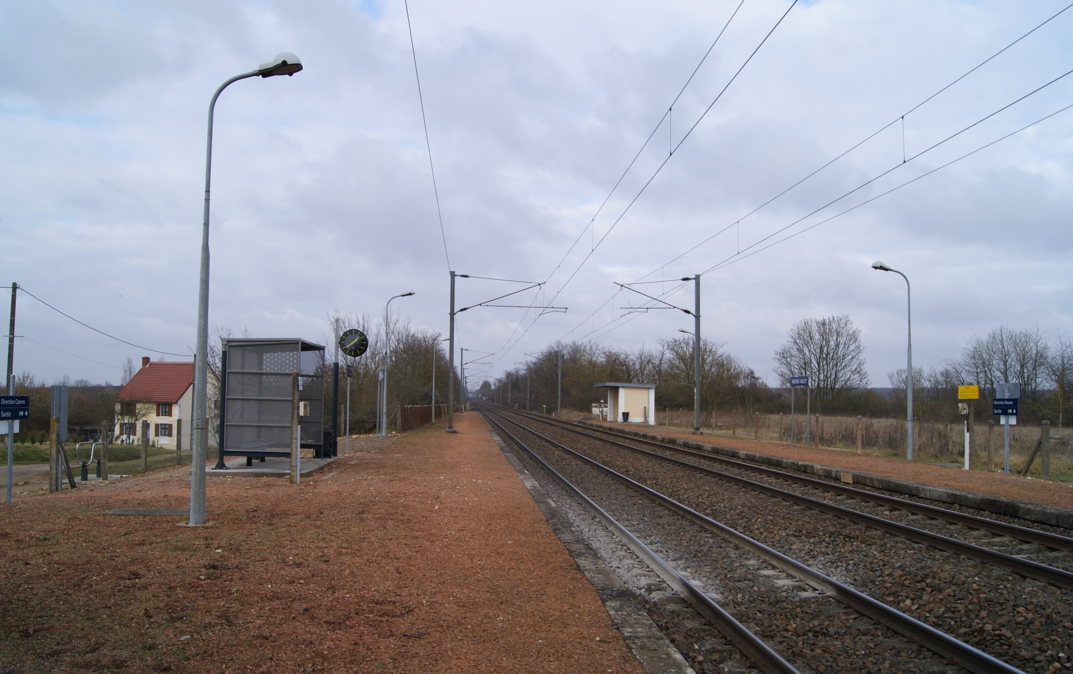 La halte de Mesves Bulcy